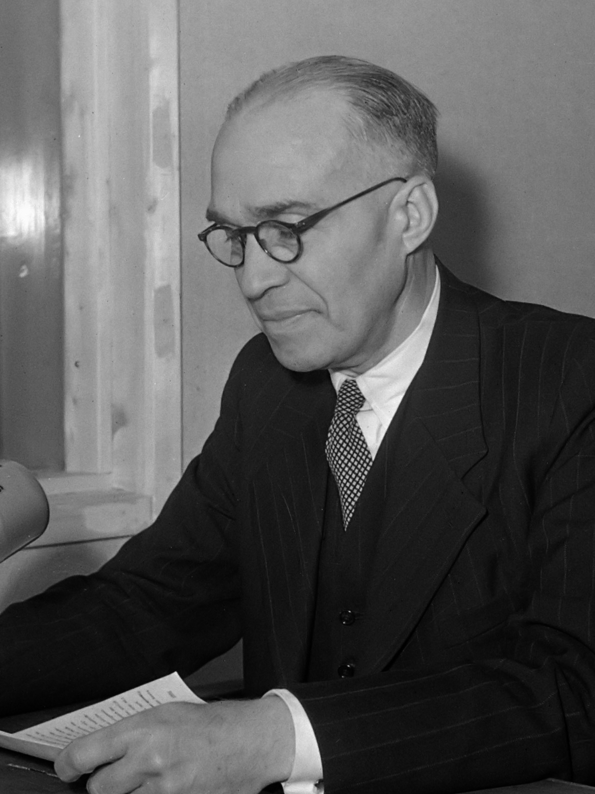 Minister Logeman 1945